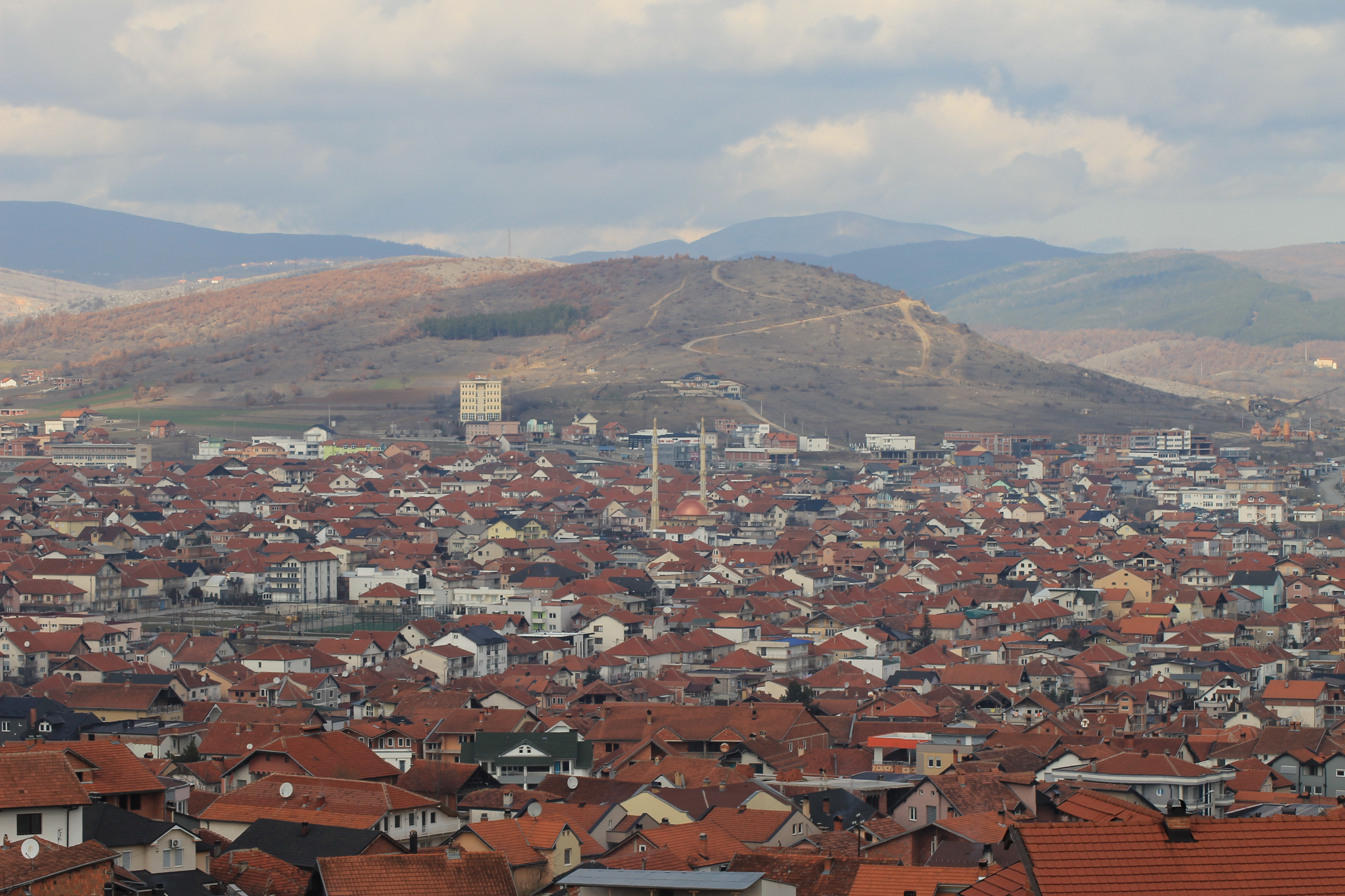 (Ish-Gavrani), dikur tokë pjellore e bonitetit të lartë, në veriperëndim të qytetit, tani vendbanimi i urbanizuar sipas planit urbanistik të viteve 70 të shekullit të kaluar.